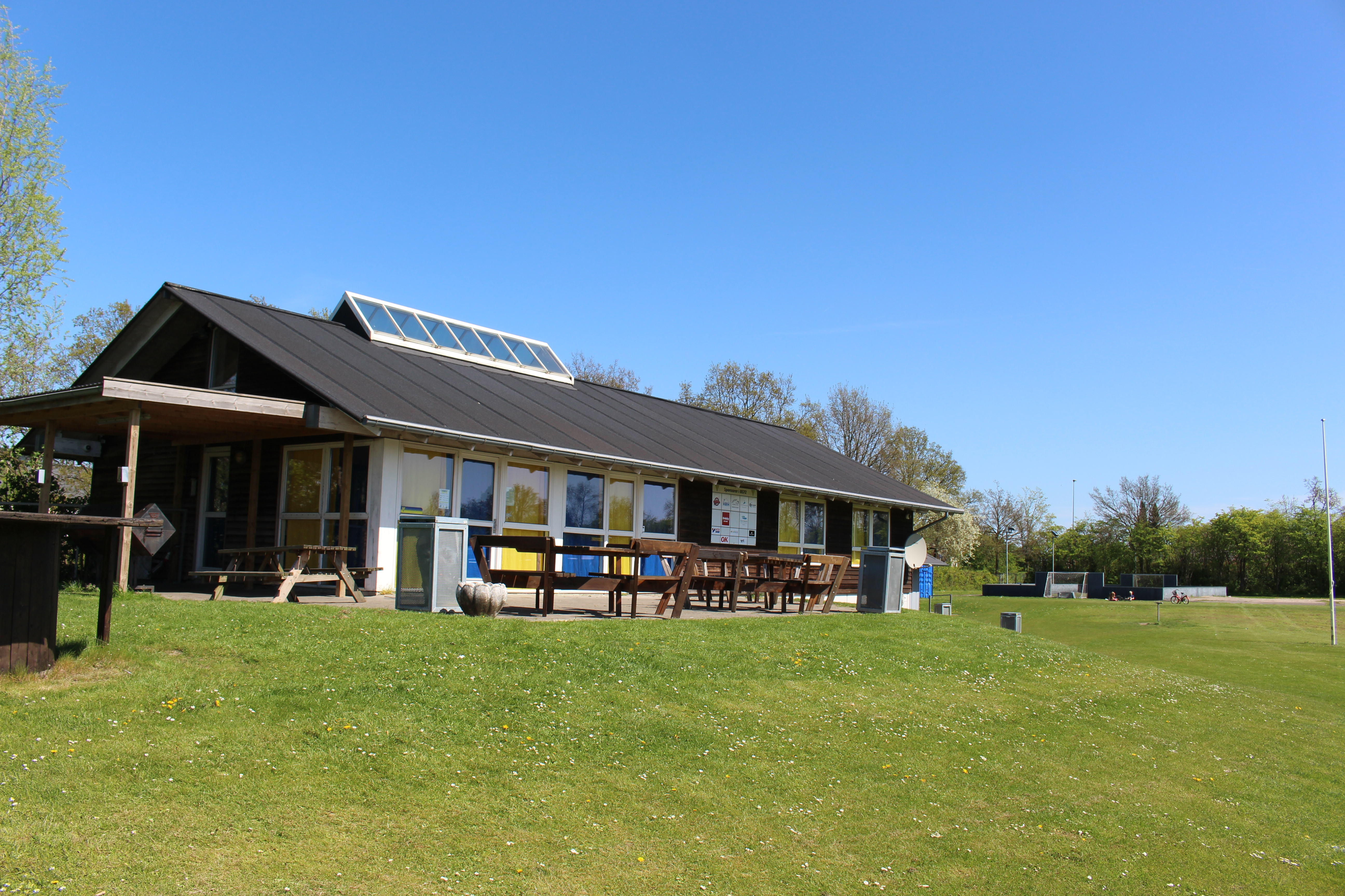 BS72 klubhus